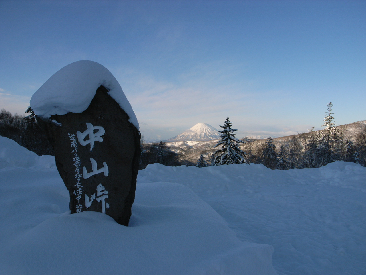 中山峠から見る羊蹄山